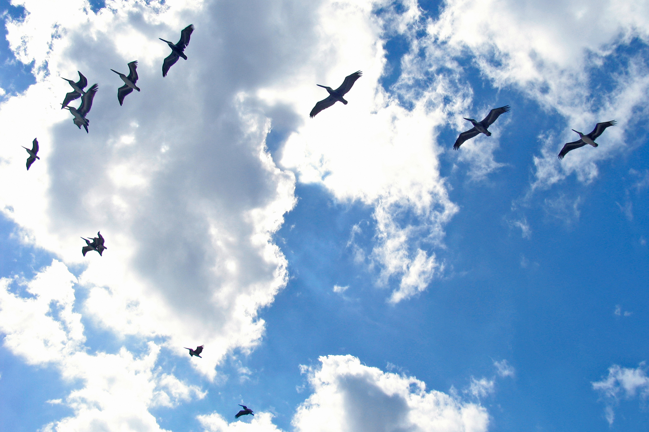 Grupo de pelícanos en formación a su paso sobre la bahía de La Habana, se puede apreciar el momento de intercambio del líder. Estas aves migratorias vienen a Cuba cada año desde norteamérica durante la temporada invernal del hemisferio norte. Pelicans flock flying over Havana Bay area. Note the leader exchanging his position. These birds come to Cuba every year from north america